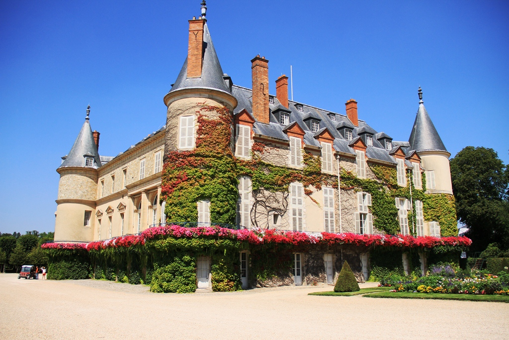 Vue du chateau de Rambouillet, coté jardin